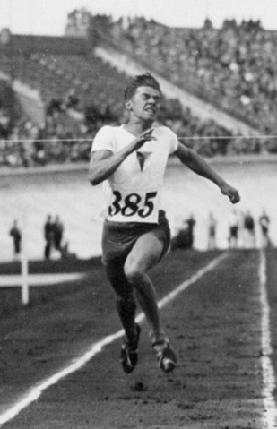 Olympische Spelen 1928 Amsterdam, Nederland : Finish van de achtste serie van de 100 meter hardlopen.